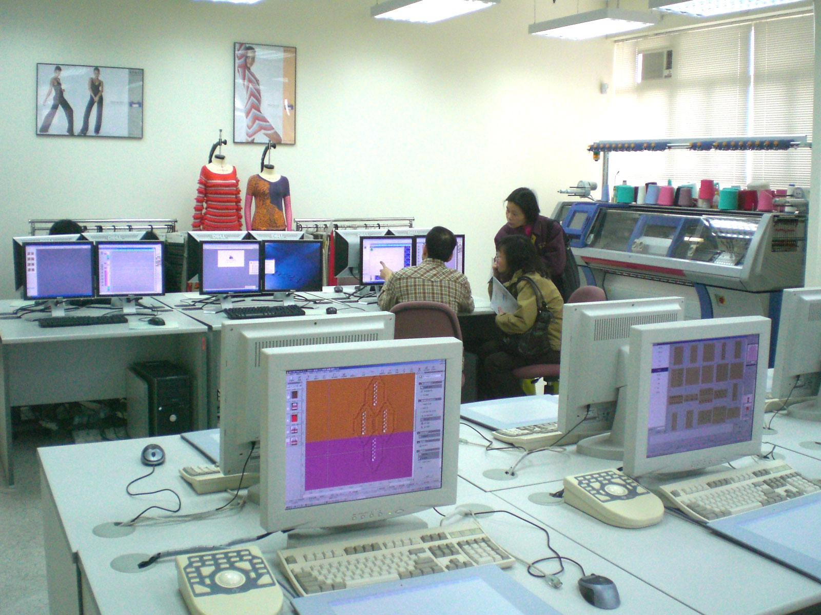 製衣業訓練局牛頭角大業街九龍灣訓練中心開放日